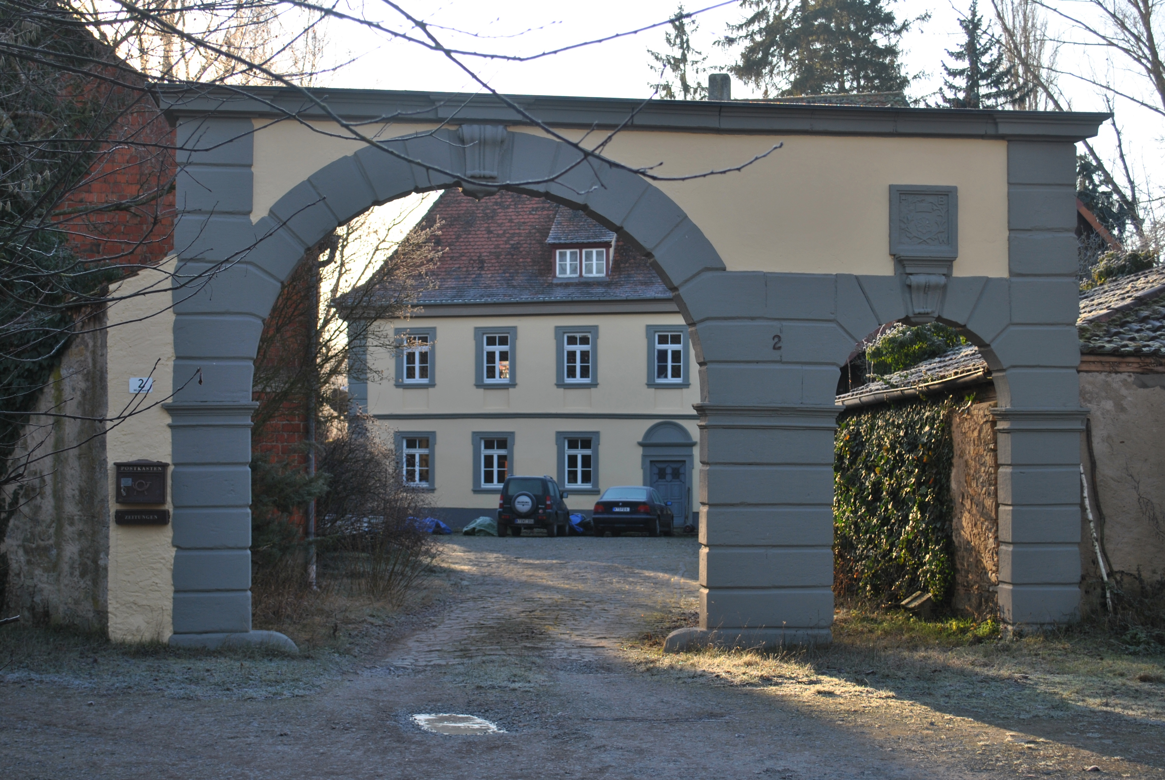 Ehemalige Mühle Zweigeschossiger Walmdachbau mit geohrten Fensterrahmungen, Eckpilastern und Geschossgesims, bezeichnet „1700“